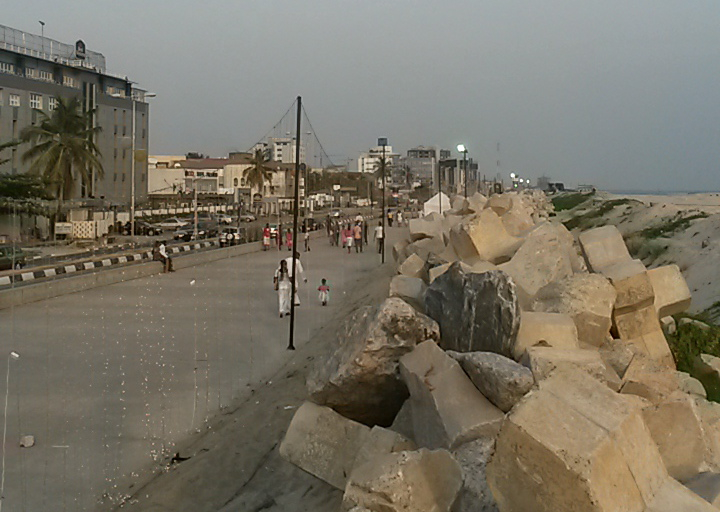 Bar Beach, Lagos, Nigeria